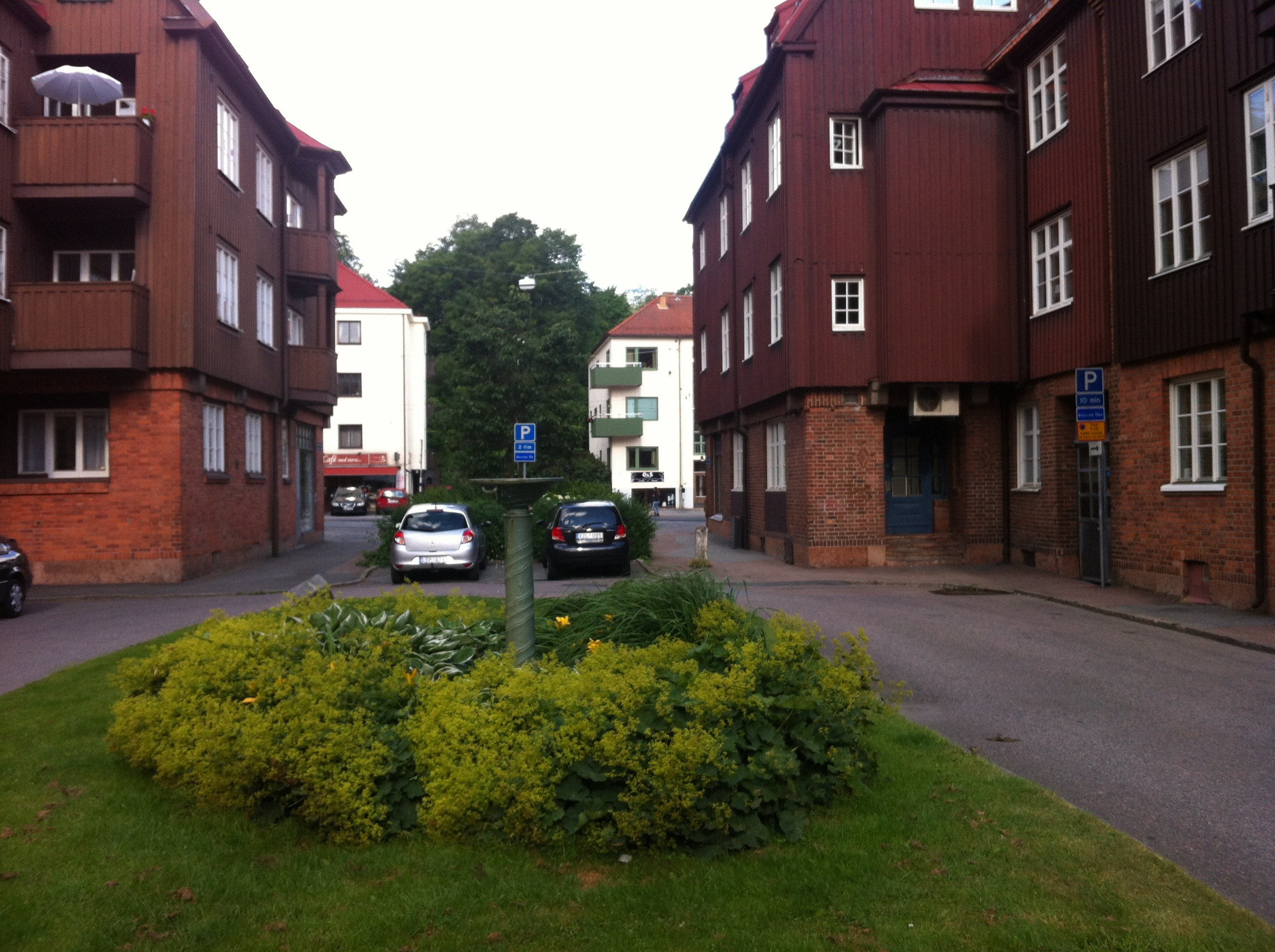 Fontän på Uddevallaplatsen i Bagargården, Göteborg.